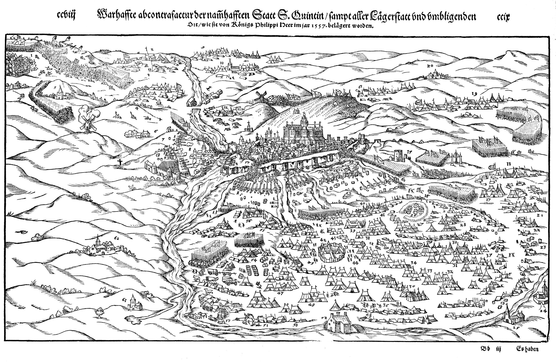 gravure sur bois publiée dans la Cosmographie de Sebastian Munster, édition de 1598.